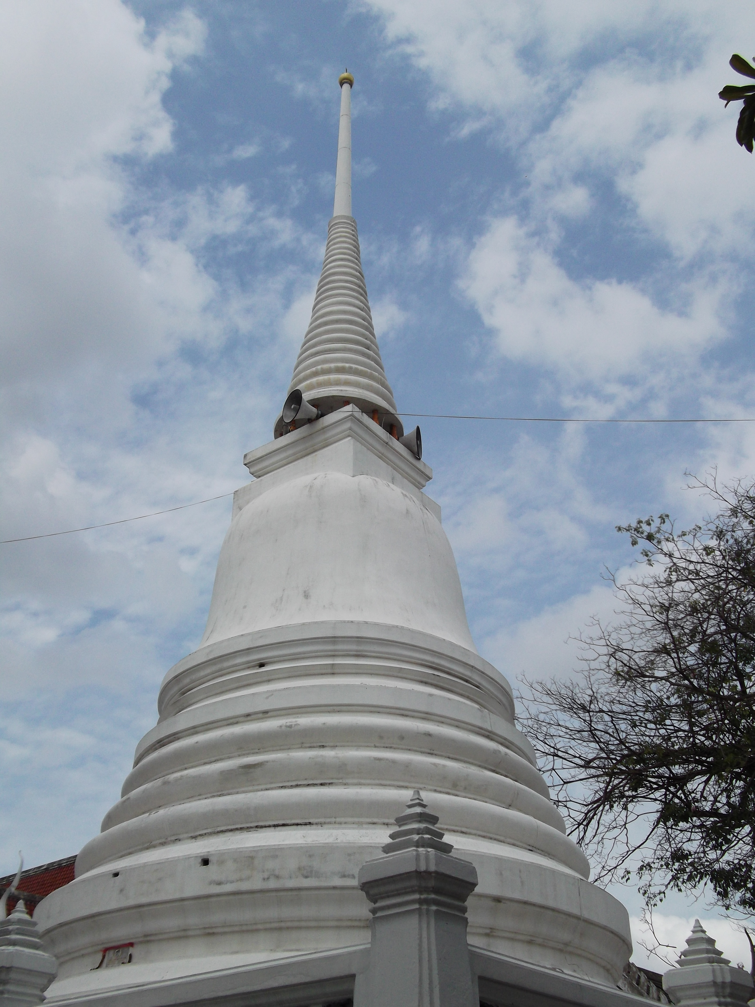 วัดโพธินิมิตร